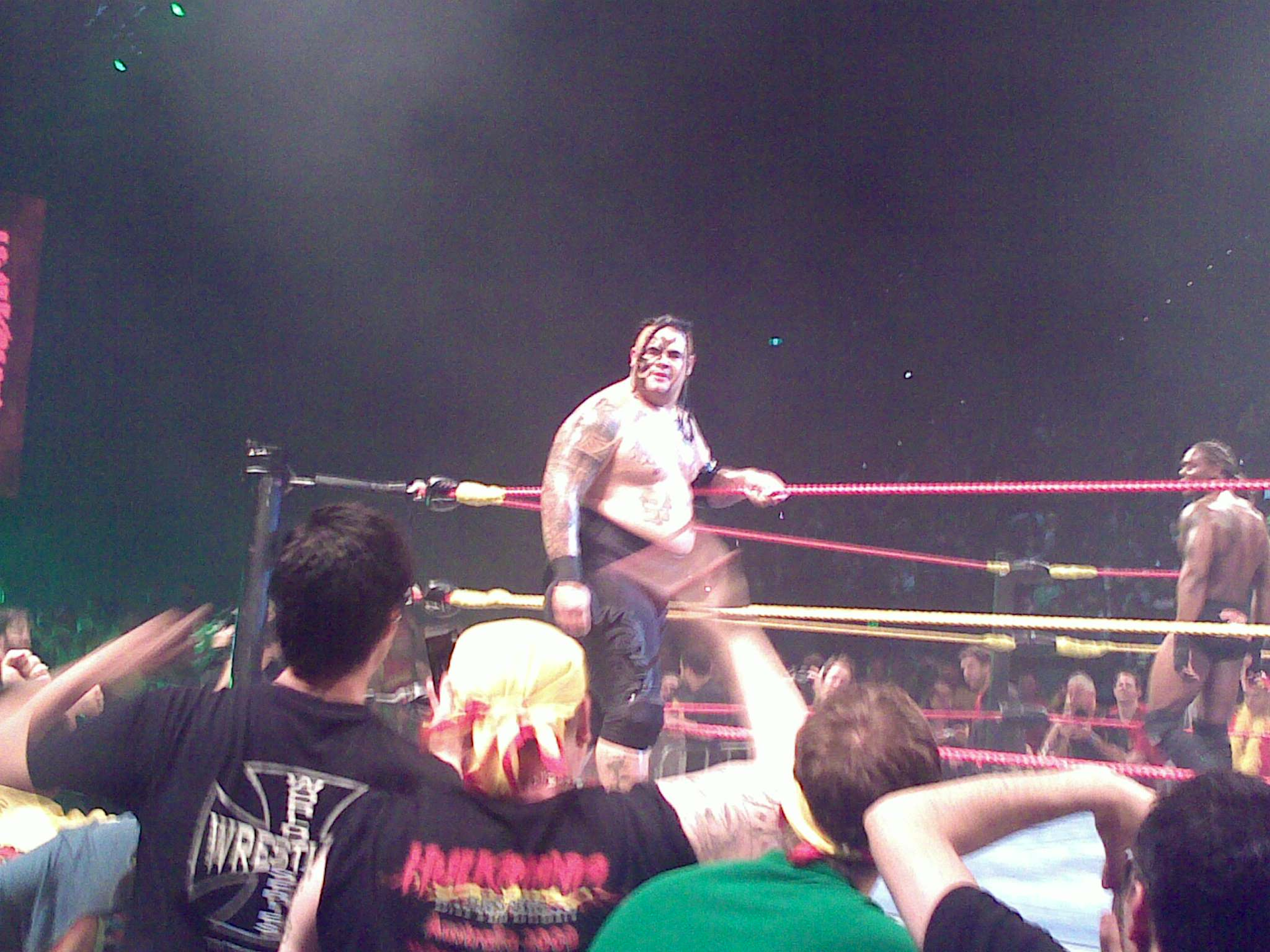 umaga as Rumaga